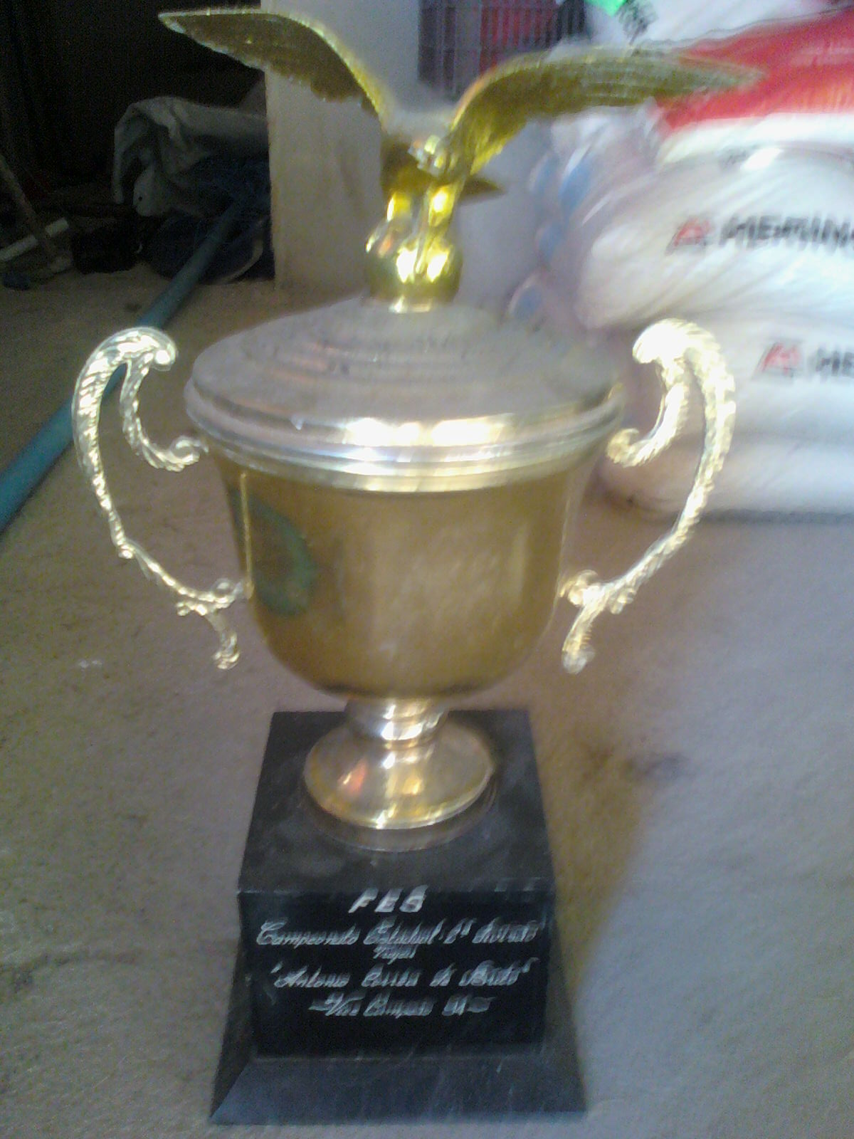 Taça conquistada pelo Mateense no vice campeonato da série B de 94